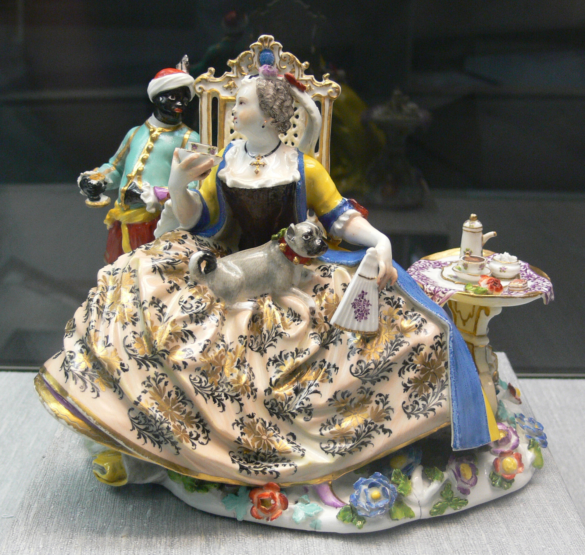 Dame mit Mohr und Tischchen, Porzellan, Meißen um 1740 Kunstgewerbemuseum Berlin, Inv. Nr. HF 220